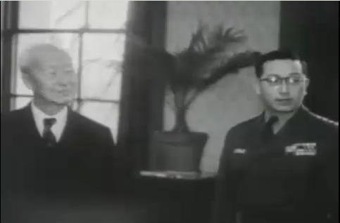 정일권 참모총장(오른쪽)과 이승만 대통령(왼쪽)